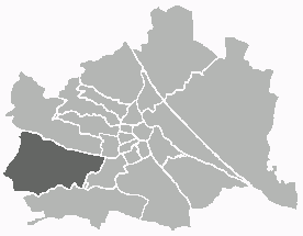 Positionskarte des 13. Wiener Gemeindebezirks Unter Verwendung einer Vorlage von Extrawurst. Public Domain.